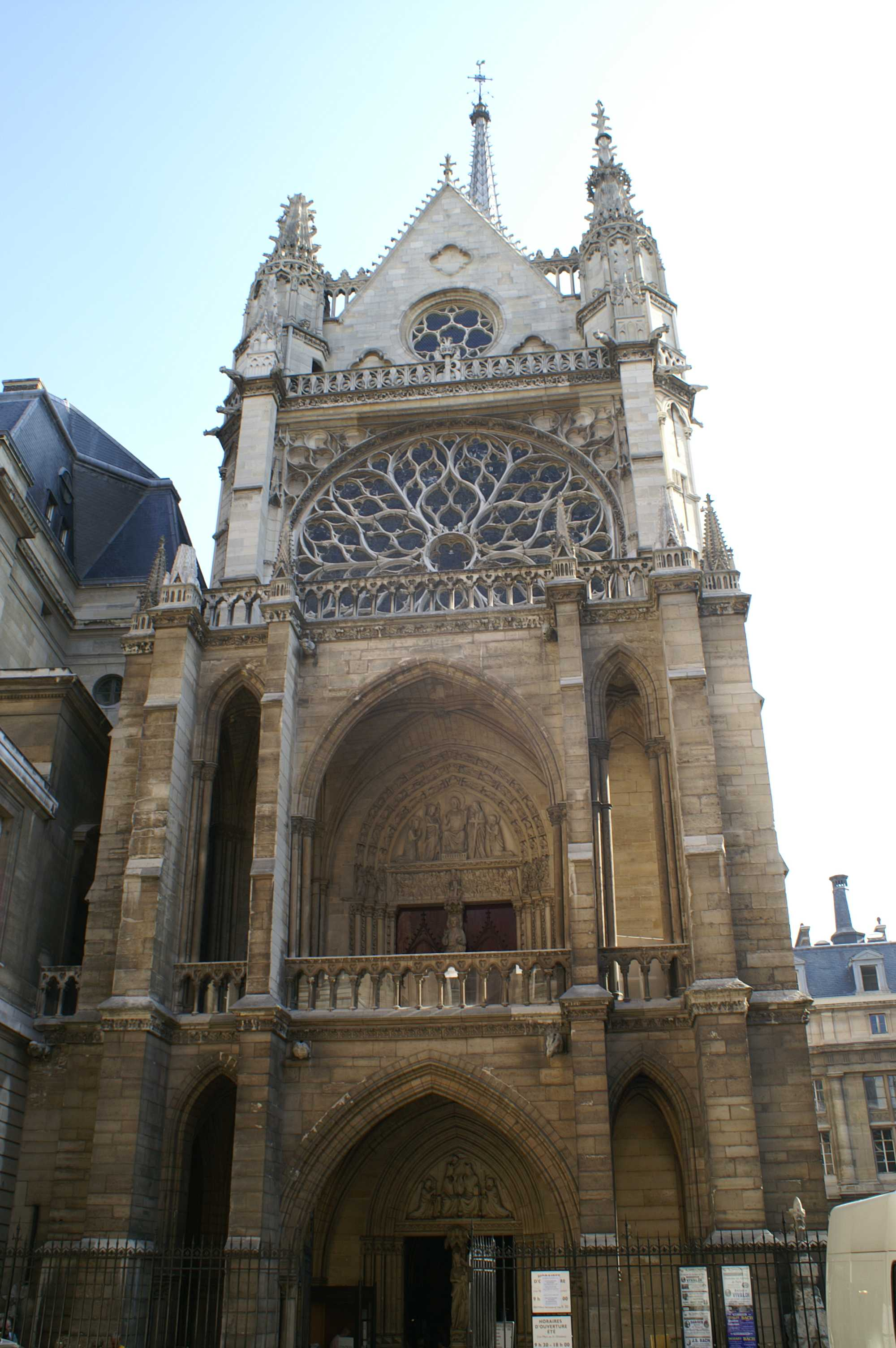 Sainte Chapelle - Paris - West facade